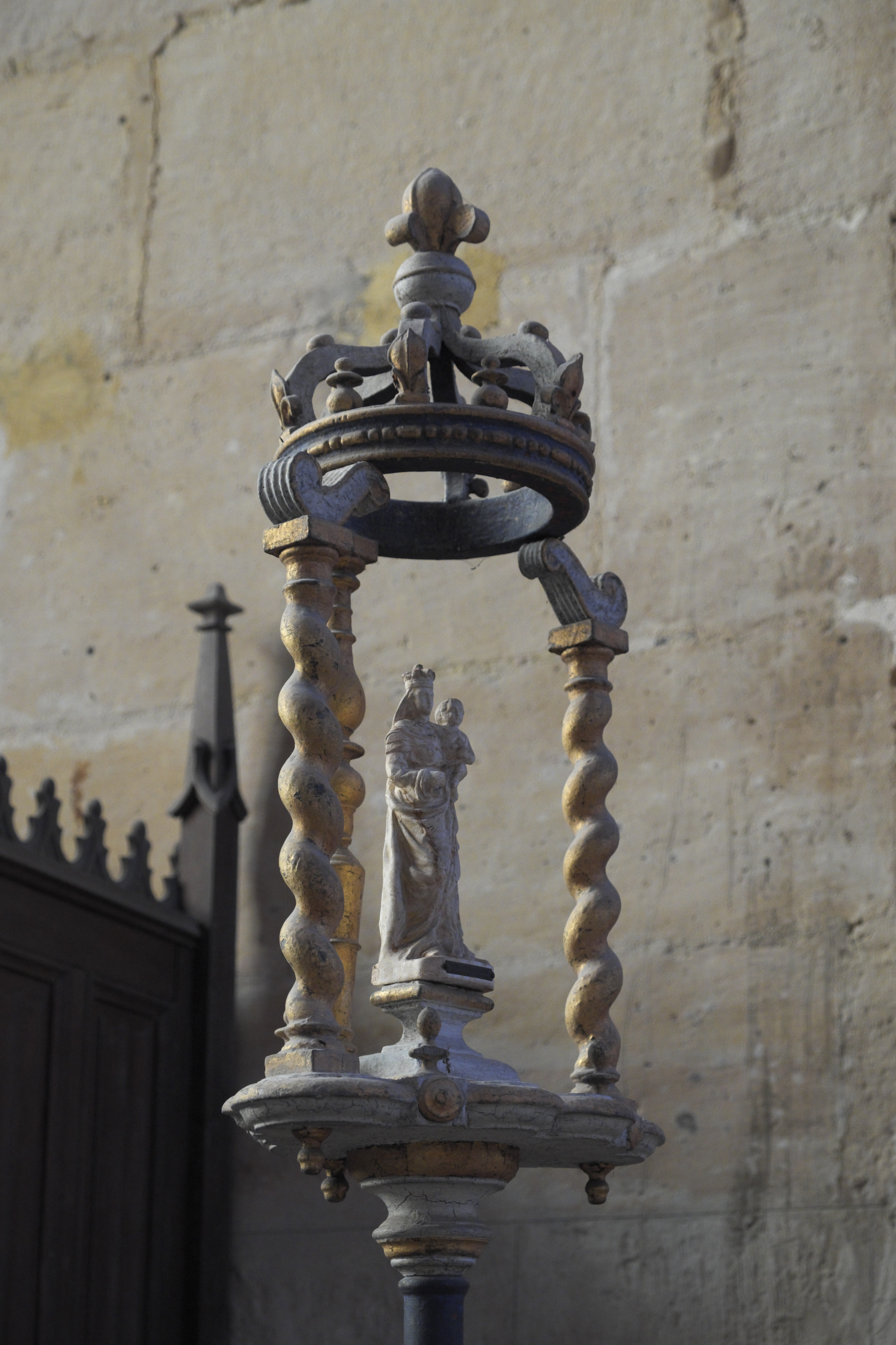 Katholische Pfarrkirche Notre-Dame in Vétheuil im Département Val-d’Oise in der Region Île-de-France (Frankreich), Prozessionsstange